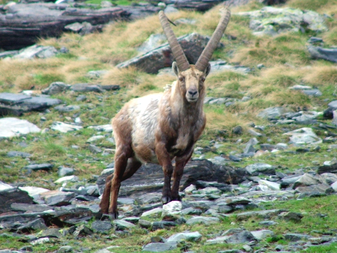 fatta da me